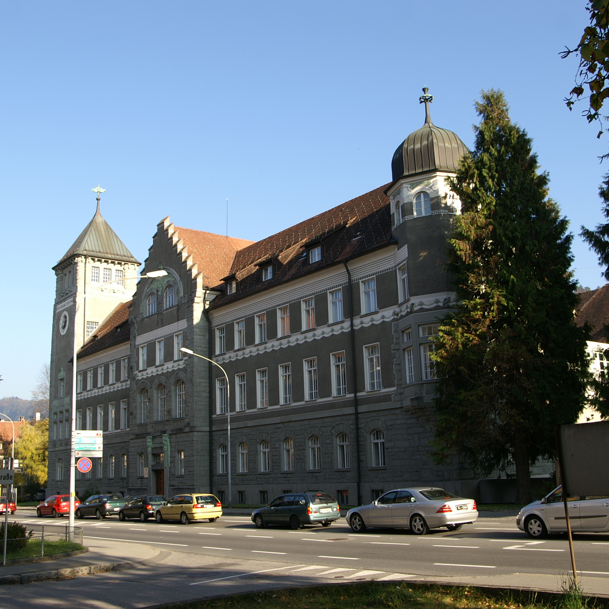 Landesgericht für Vorarlberg, Schillerstrasse 1 in Feldkirch. Architekt: Ernst Dittrich Baujahr 1903/05 Jugendstil - Strassenseite Schillerstrasse